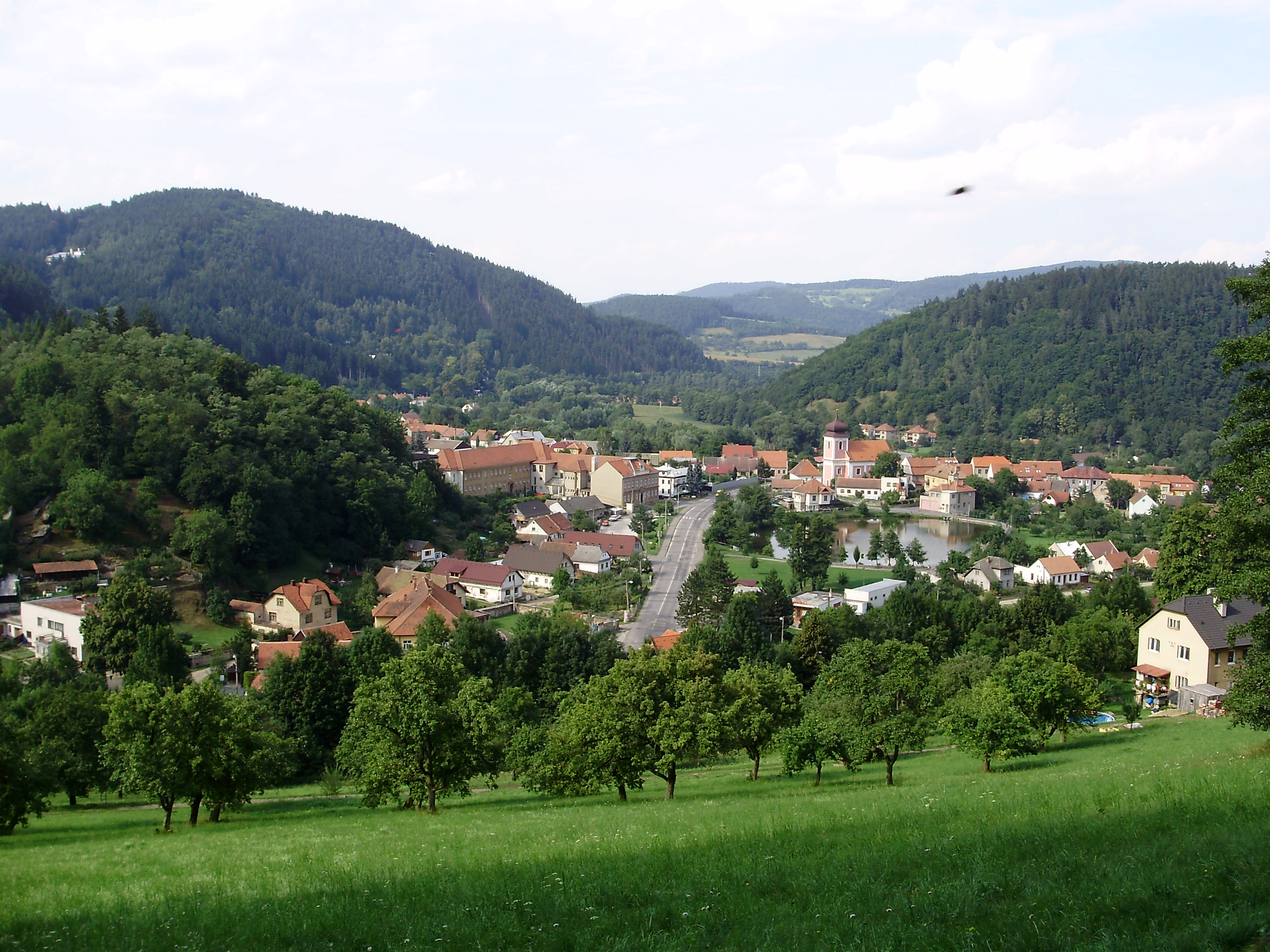 Nedvědice - foceno z kopce nad městysem (Czech republic)